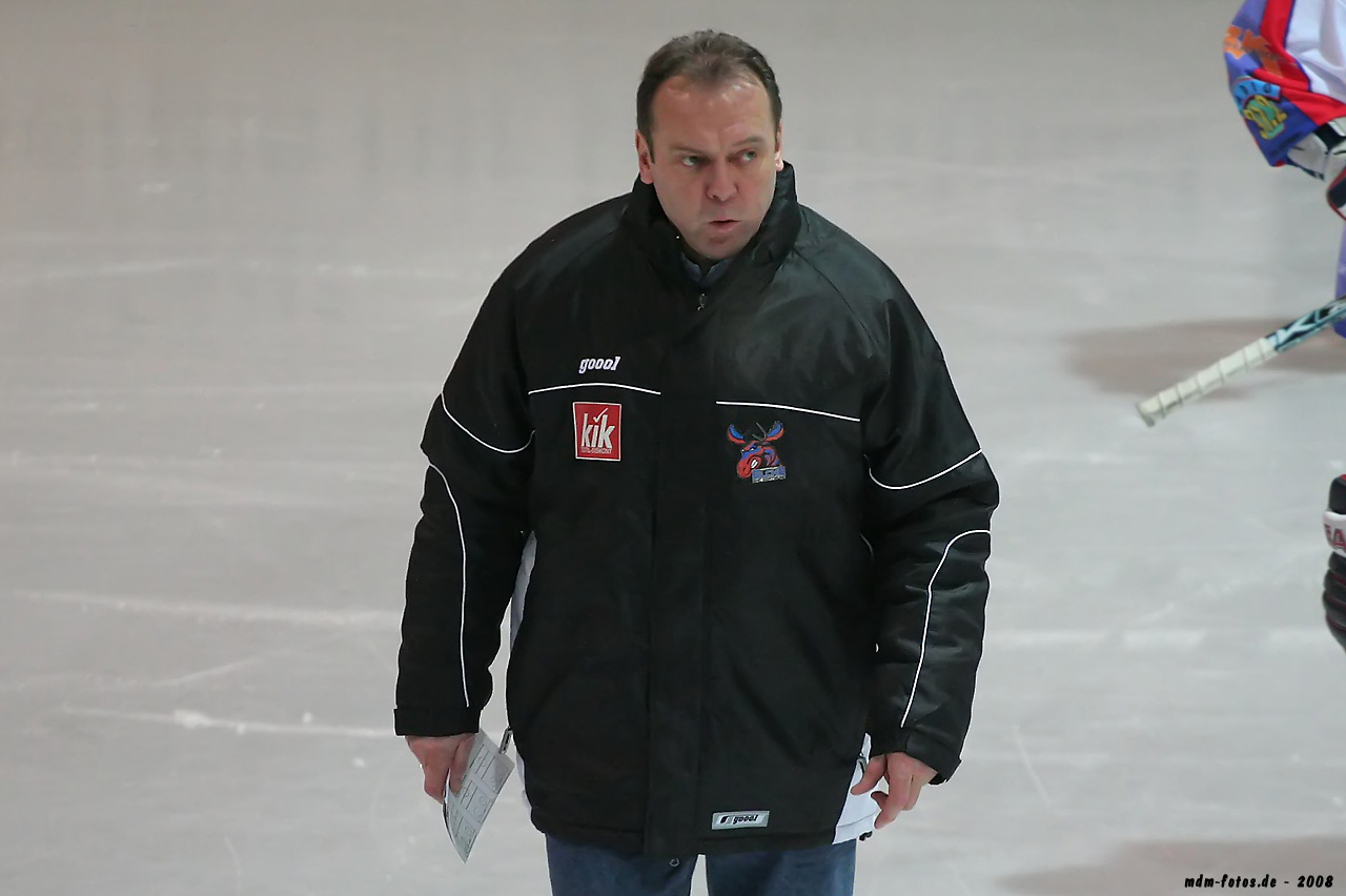 Der Elche Trainer Jesse Panek